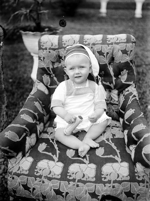 Negatief. Portret van een baby in een met cretonne beklede stoel in de tuin